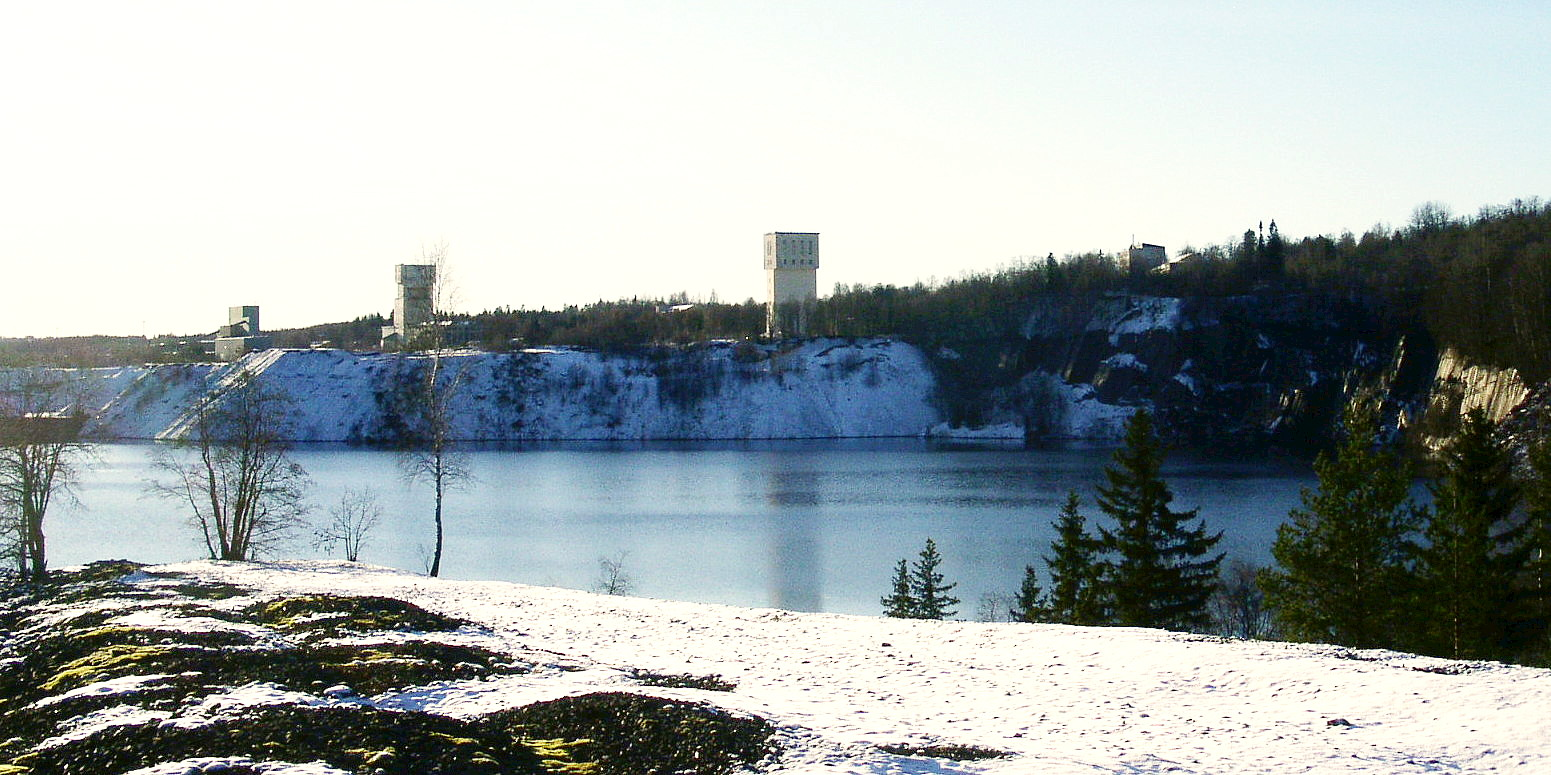 Grängesbergs gruva sedd från Norra tippen. Byggnaderna (de som når över trädtopparna) är från vänster räknat: Pelletsverket i Lomberg, Centralschaktets lave, Jakobina lave och Gruvkontoret.